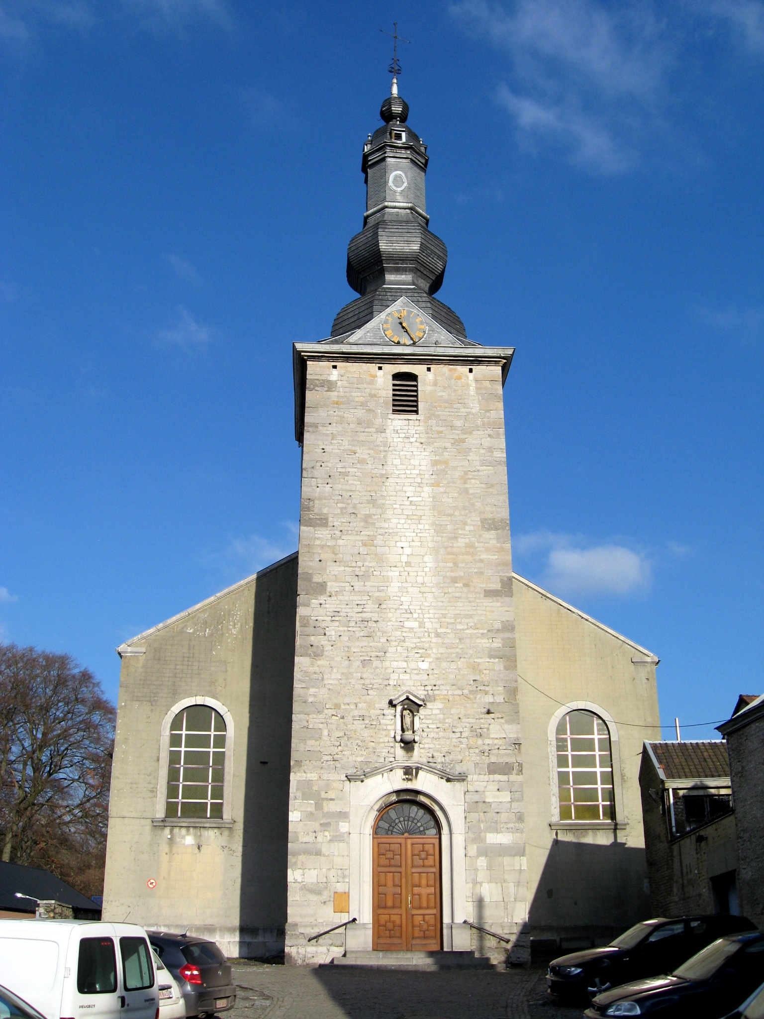 Onze-Lieve-Vrouw Hemelvaartkerk in Ensival